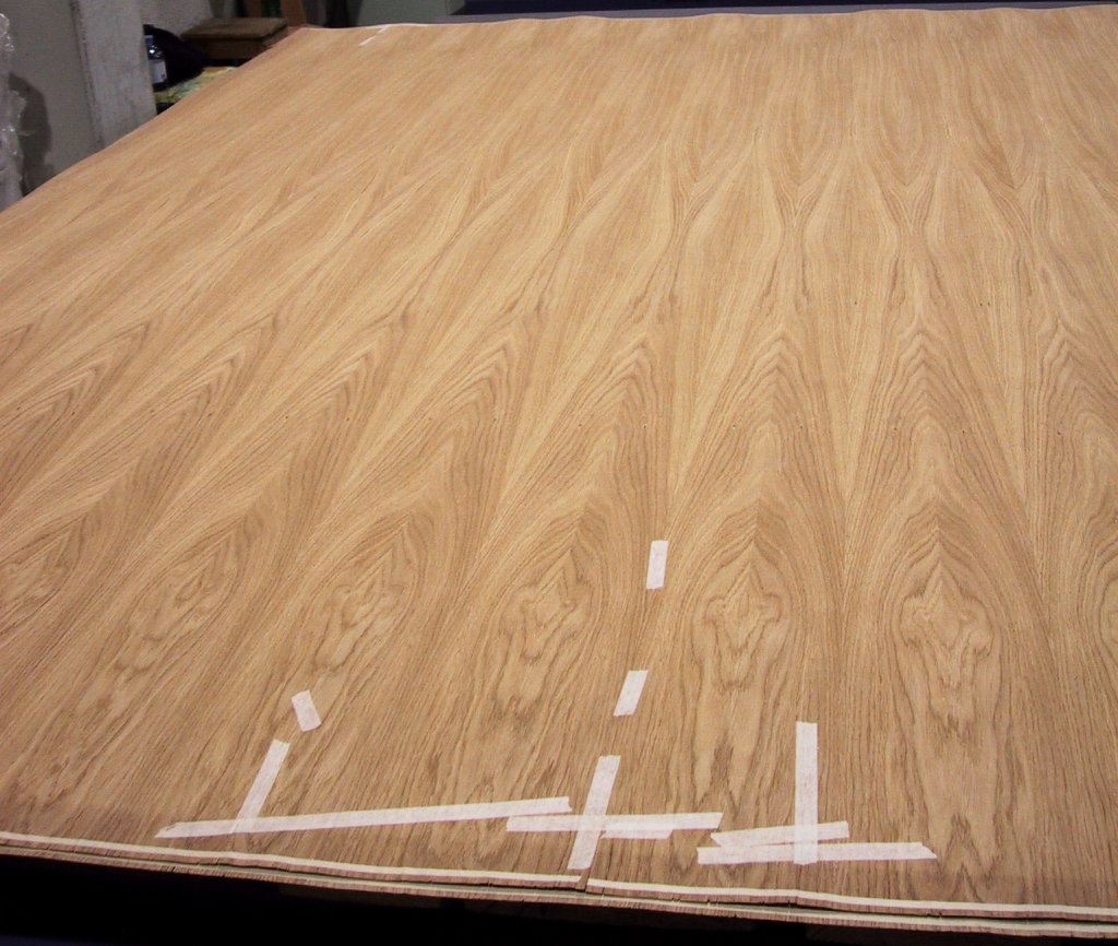 Furnierdecke / Die Klebestreifen dienen der Verstärkung des Randes und verhindern die Rissbildung bei leichten Beschädigungen.